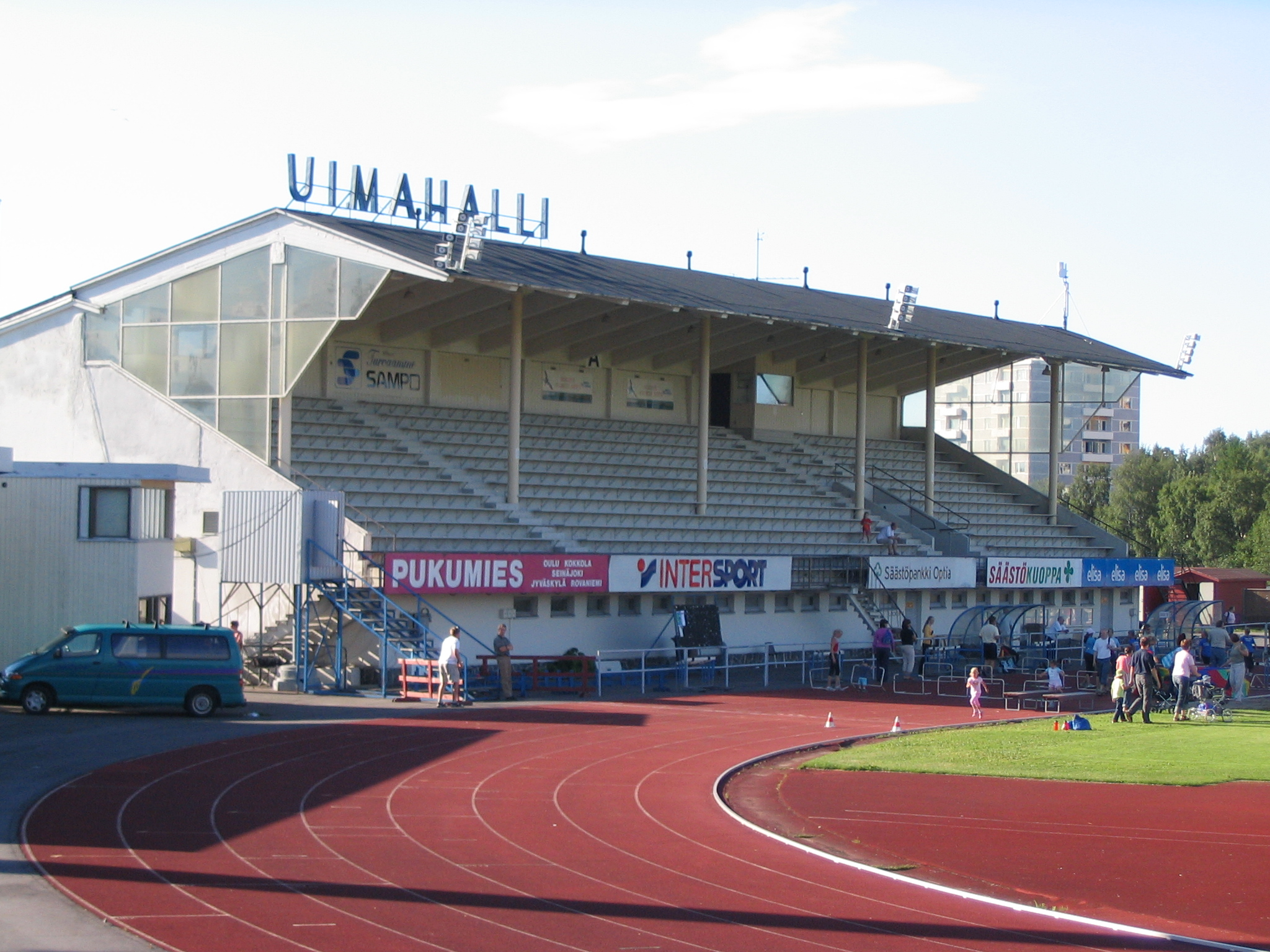 Raatin stadion, vanha pääkatsomo 26.7.2005